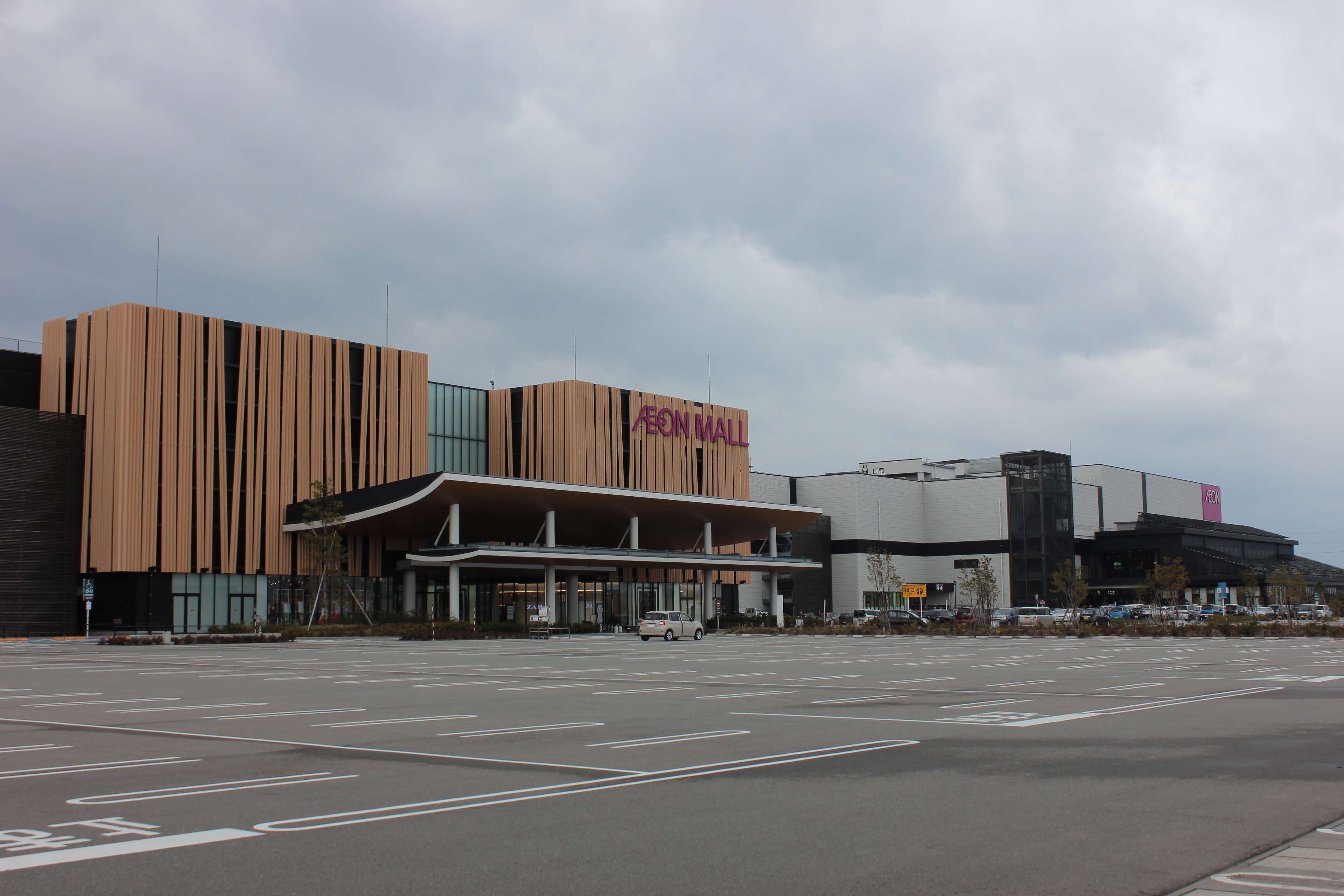 イオンモール新小松（石川県小松市） Canon EOS Kiss X5